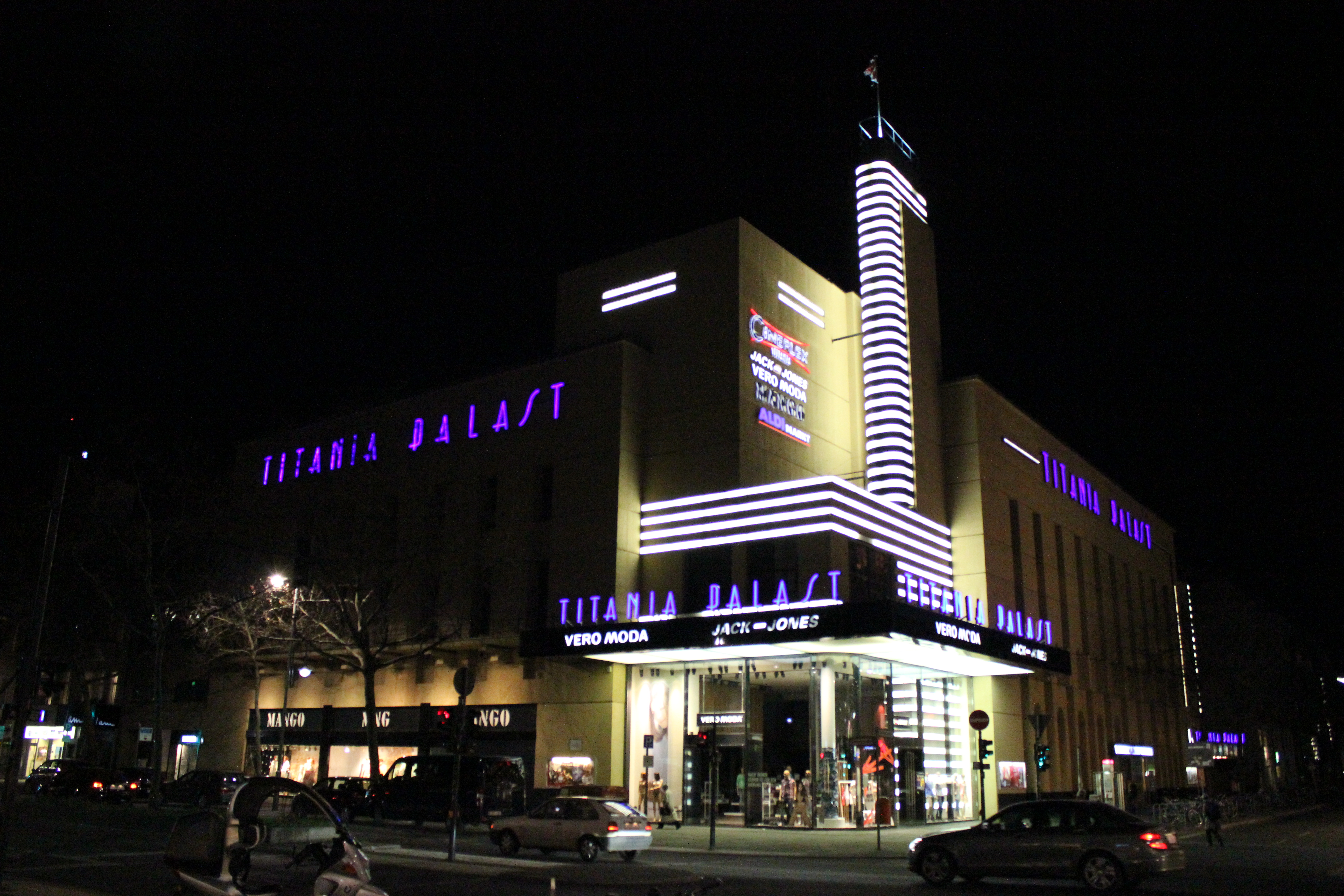 Titania-Palast, Berlin Steglitz